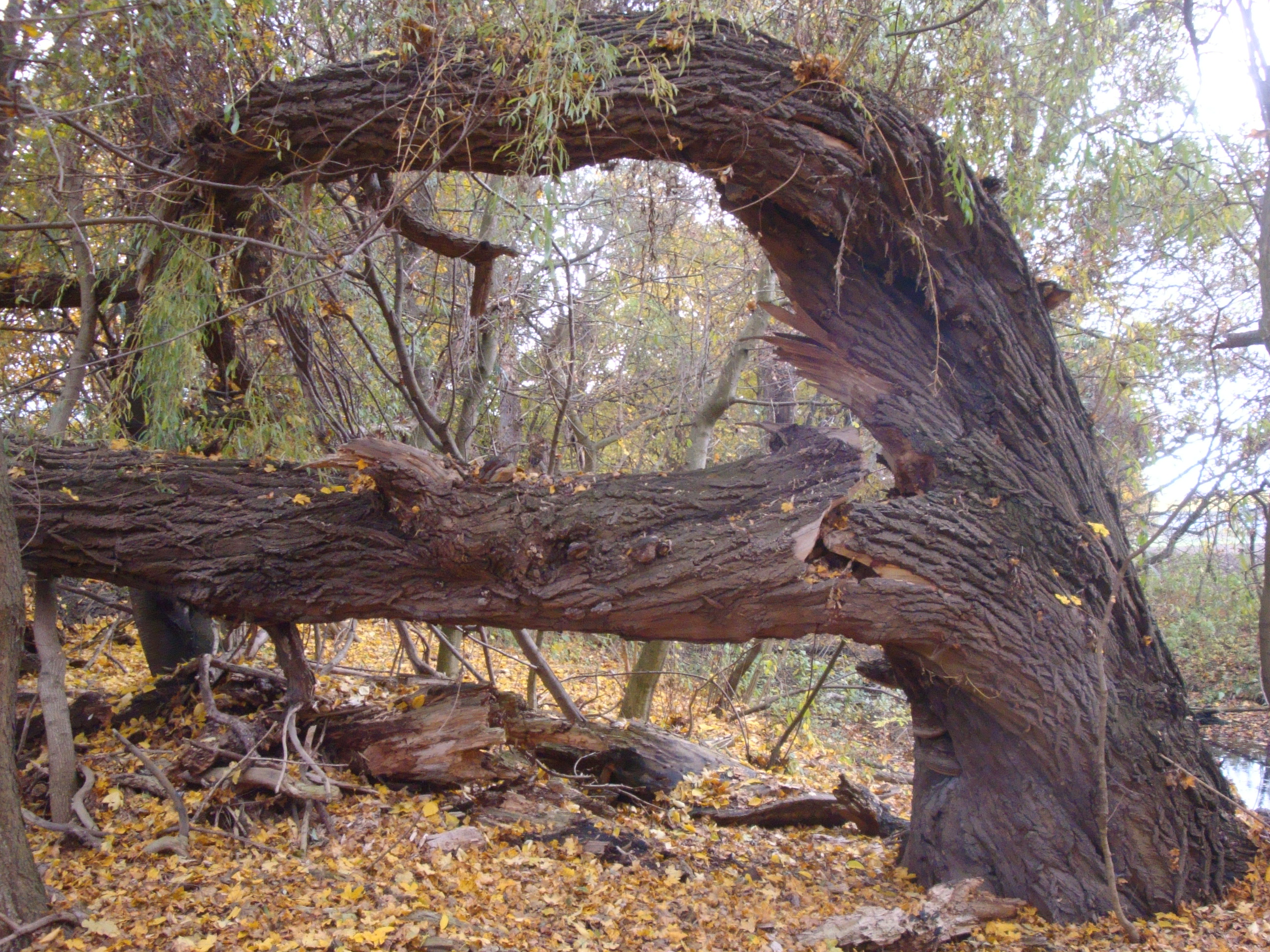 Vrba bílá na břehu Rájecké tůně, foceno v říjnu 2016